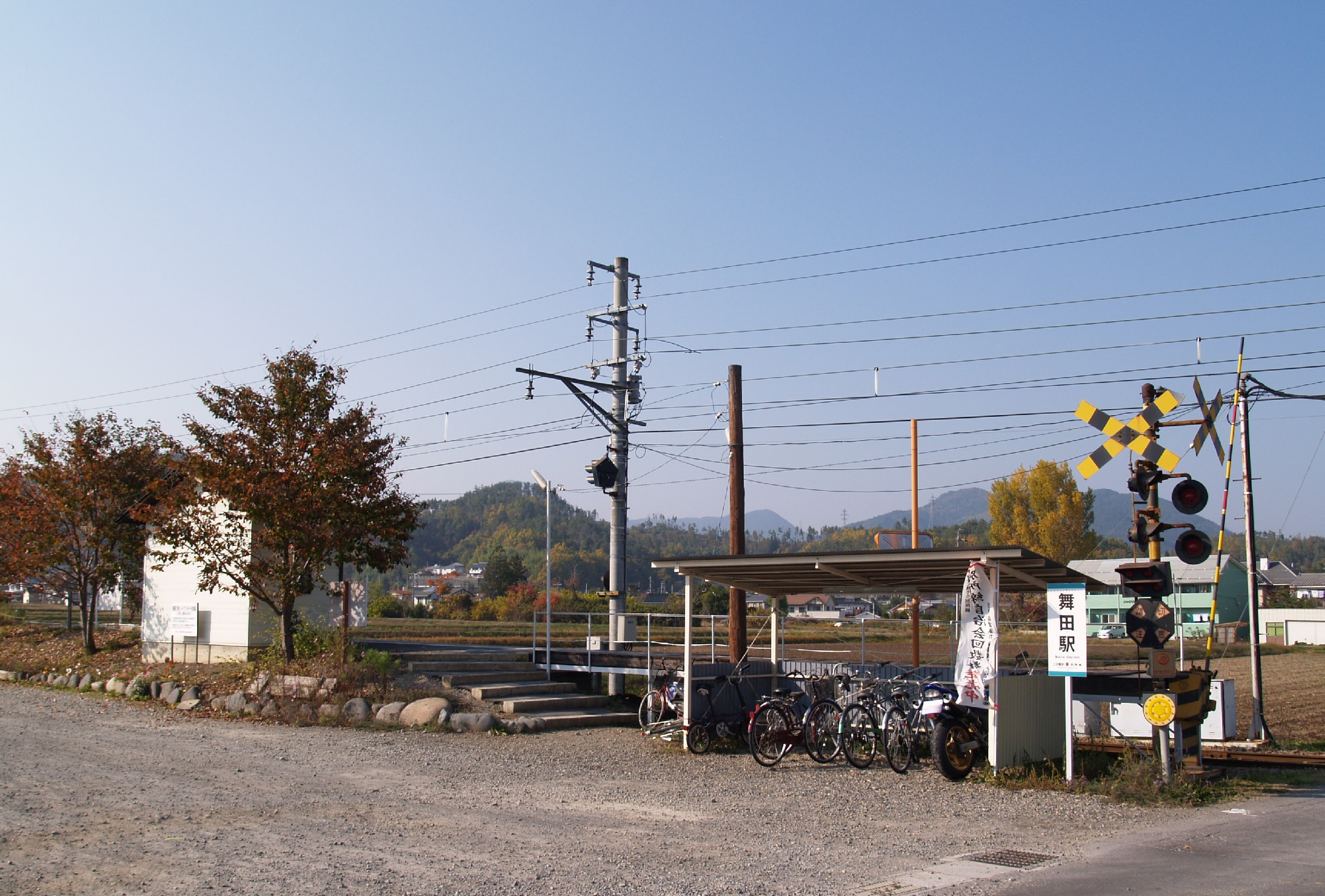 舞田駅